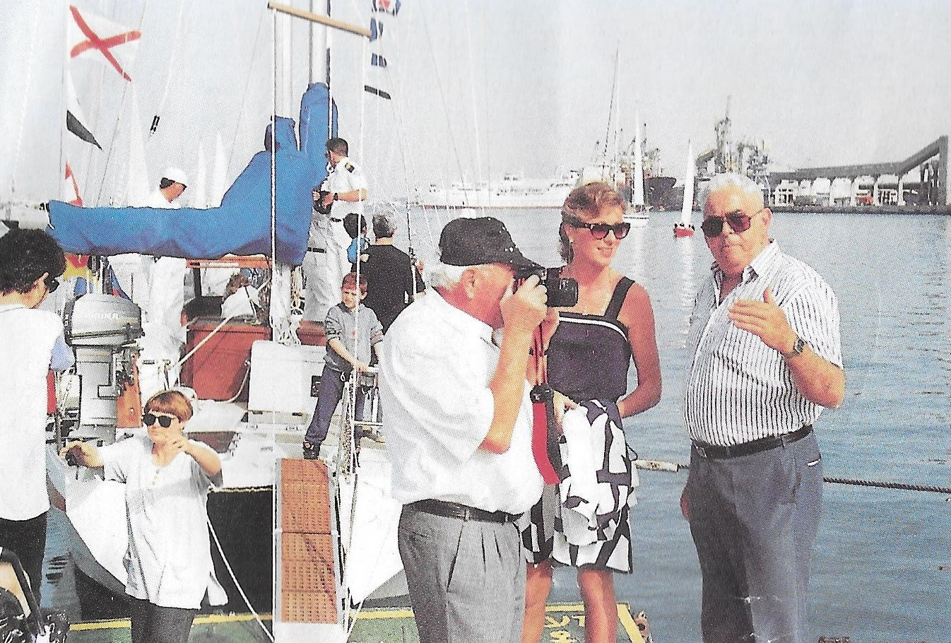 מנהל בית הספר זאב אלמוג (אברוצקי) עם תורם ספינות האימונים קהאן